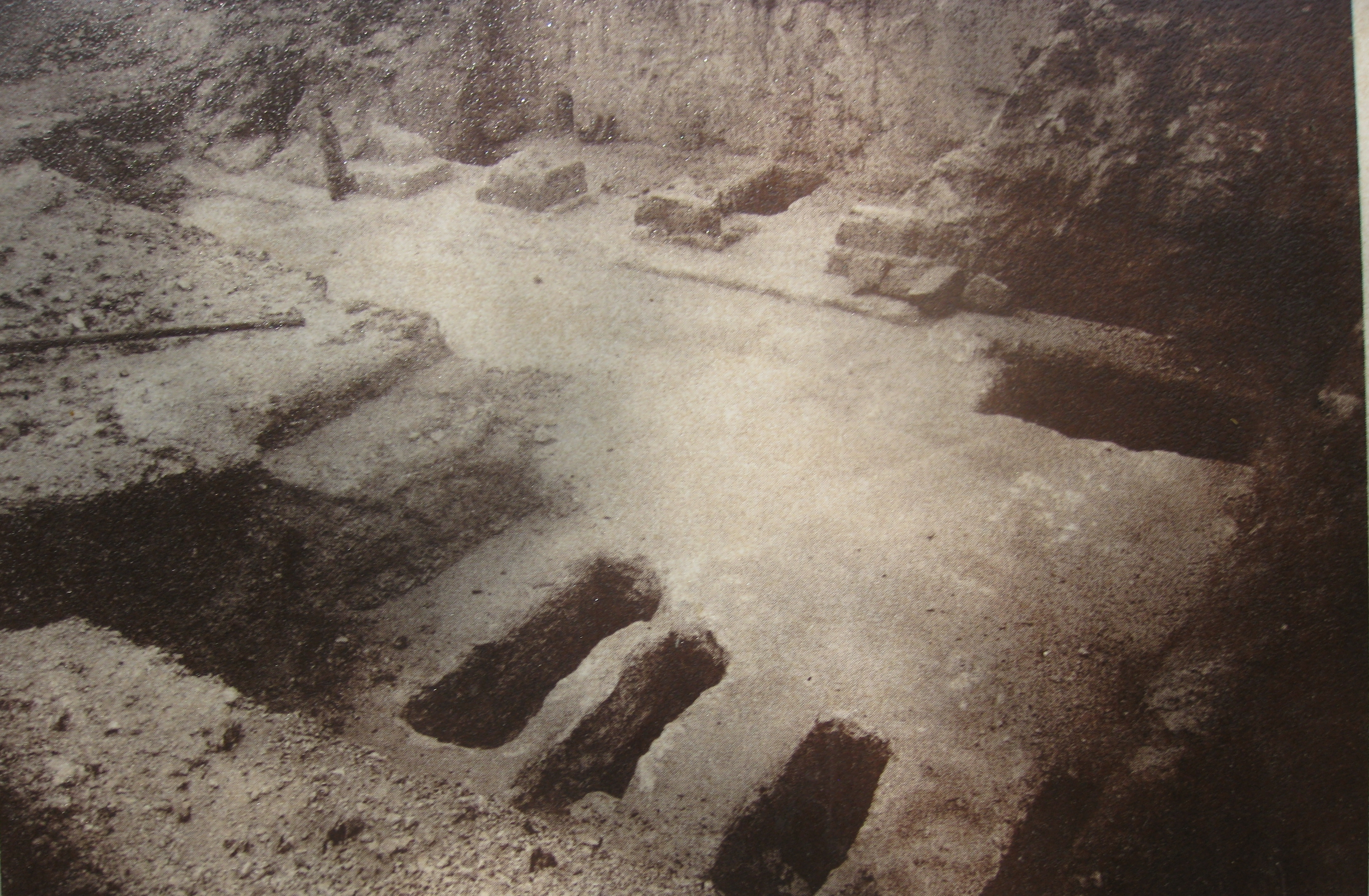 Mount Scopus הר הצופים